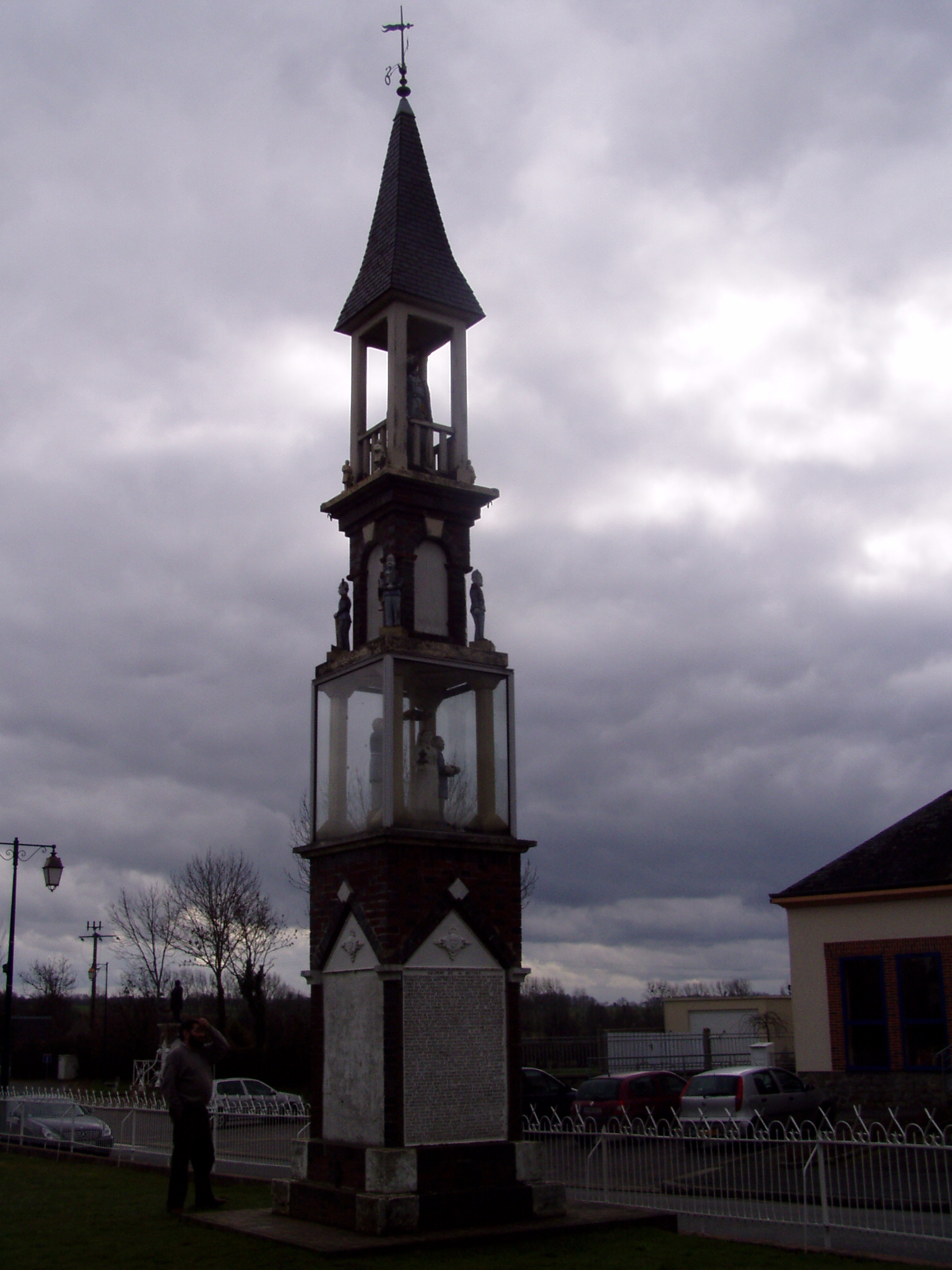 Colonne de 14 mètres de haut, à la gloire de l'ancien maire Désiré Guillemare, Saint-Ouen-sur-Iton (Orne, France)